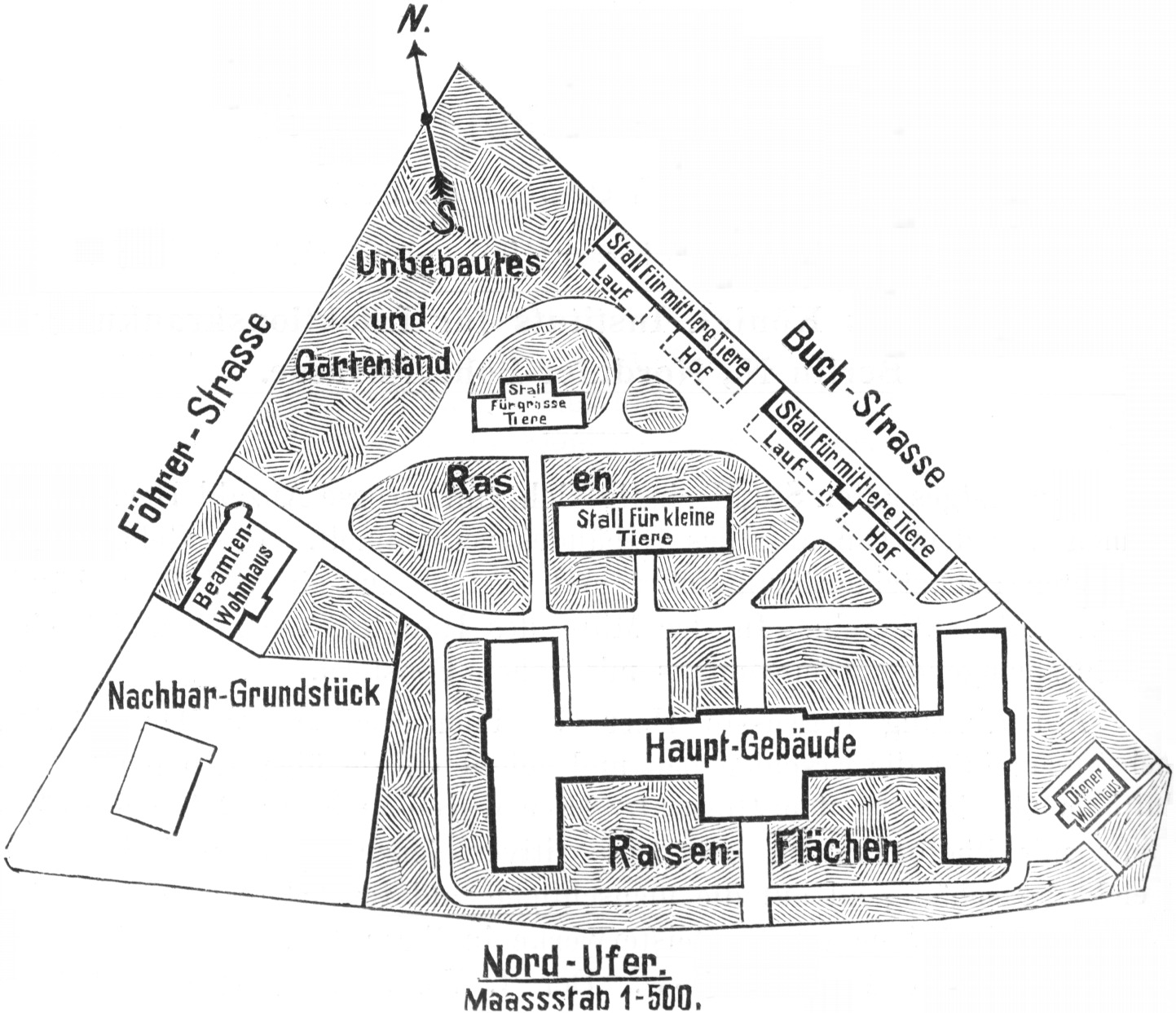 Grundriss des Instituts für Infektionskrankheiten in Berlin (Maßstab 1:500 im Druck, Breite der Zeichnung 12 cm, Höhe 9,5 cm)